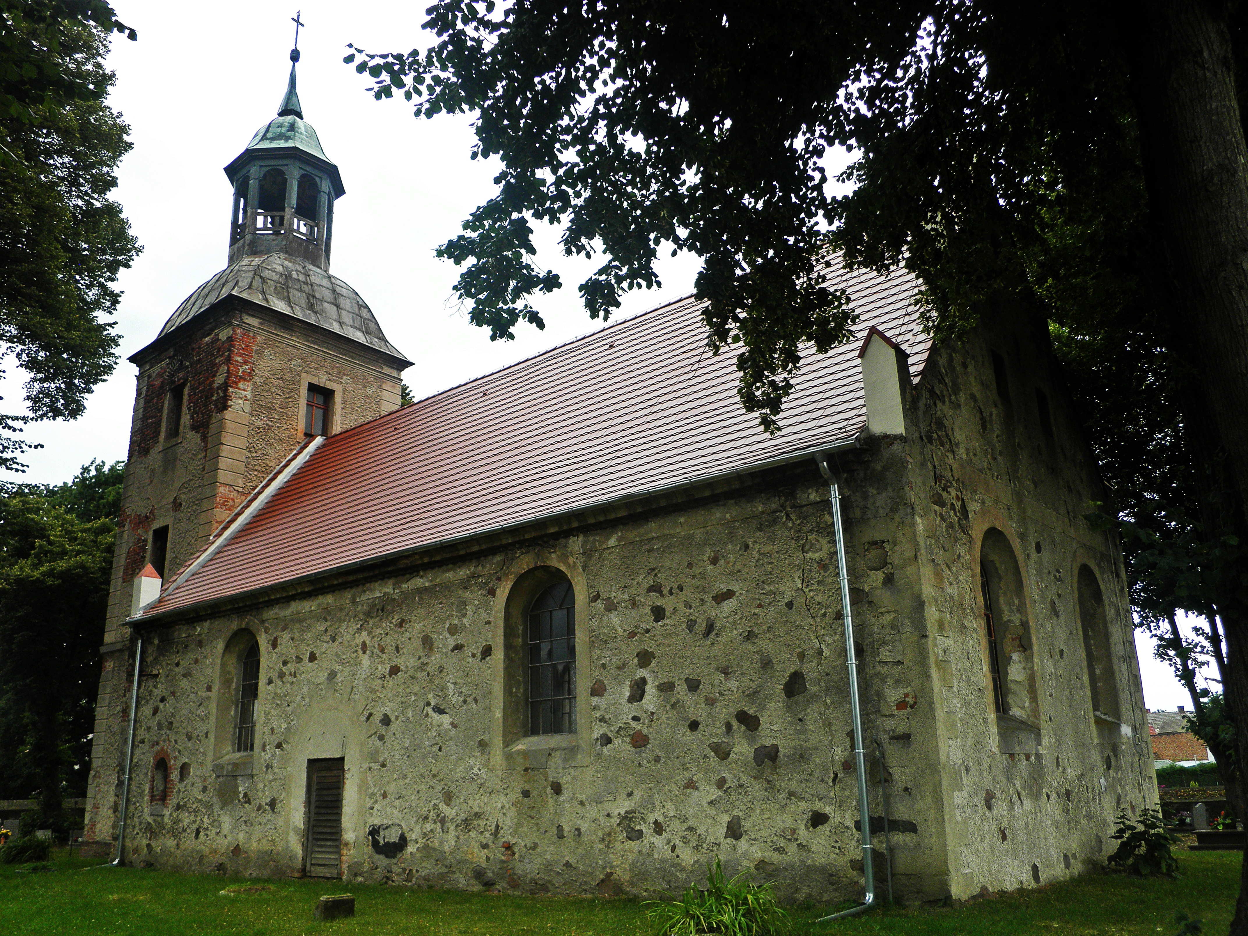 Czarnowo - rzymskokatolicki kościół filialny p.w. Świętego Ducha, 1601, kon. XVII, 1746